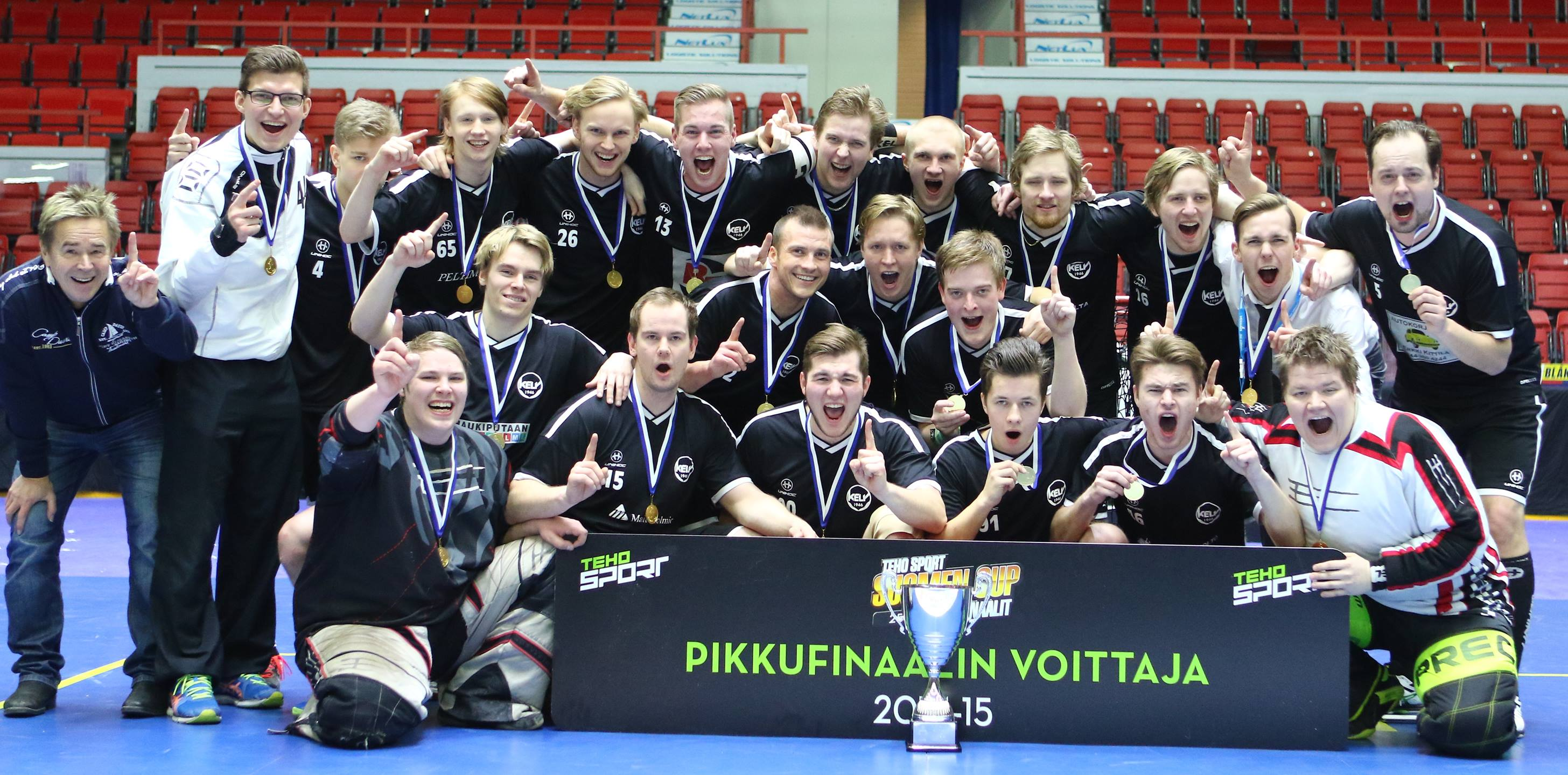 Pikkufinaalin voittanut joukkue.